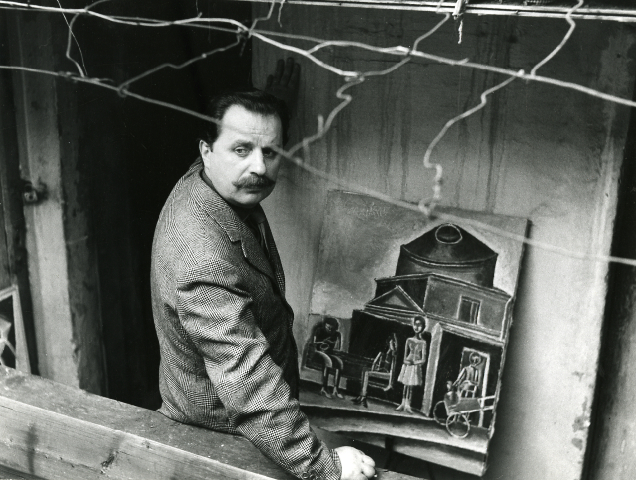 Servizio fotografico : Italia, 1965 / Paolo Monti. - Stampe: 2 : Positivo b/n, gelatina bromuro d'argento/ carta, 24x30. - ((Al verso delle stampe timbro a inchiostro con copyright: "© Copyright/ Credit to/ Paolo Monti/ Corso Sempione [...]/ Milano". - Sul coperchio della scatola iscrizione didascalica manoscritta a pennarello nero: "Ritratti/ Artisti".